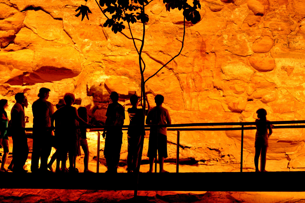 BOQUEIRAO DA PEDRA FURADA ILUMINADO